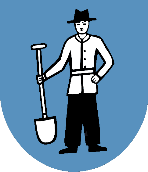 Herb Landeka w powiecie bielskim, gminie Jasienica